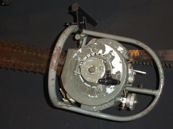 Comet motorsag med råoljemotor, konstruert av Rasmus Wiig. Saga er utstilt på Norsk skogmuseum på Elverum.